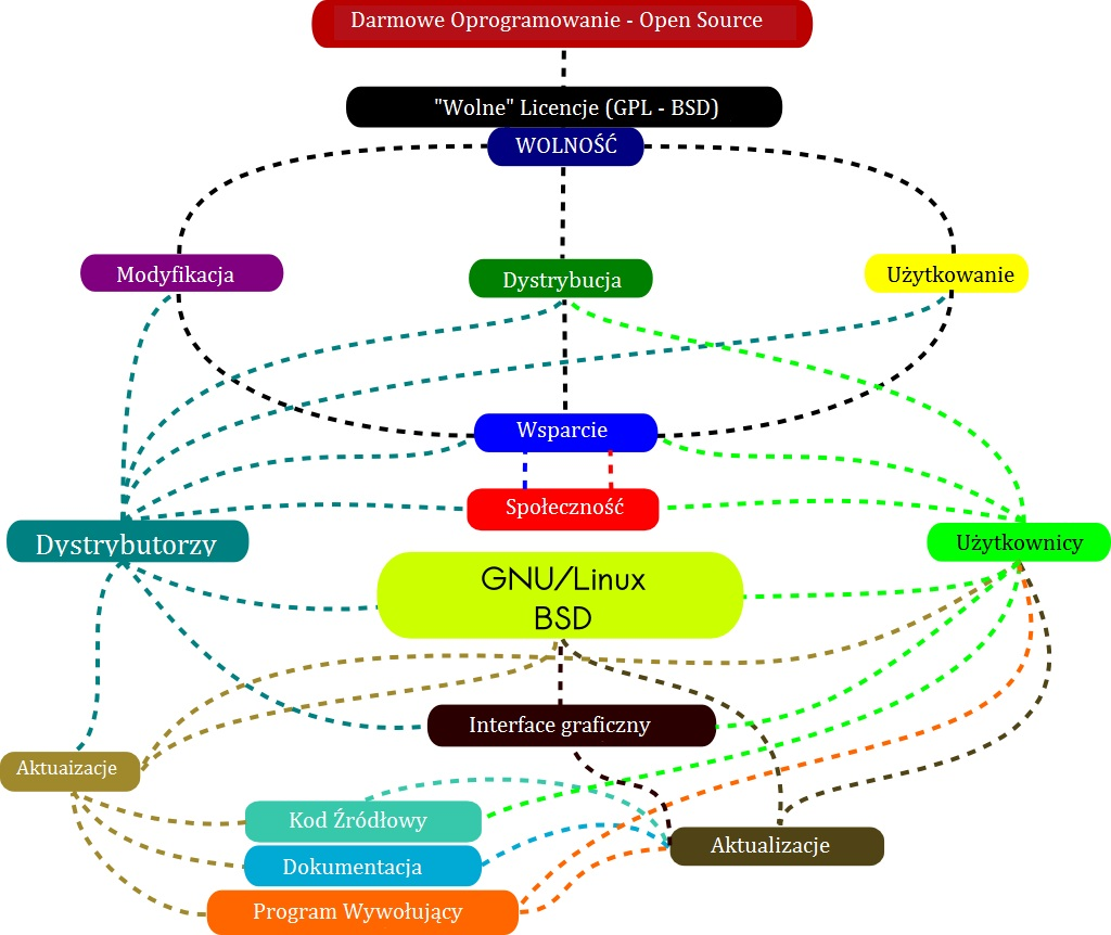 Polska wersja angielskiej mapki